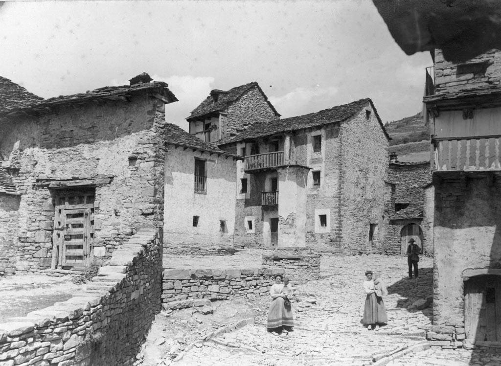 Vista general de la plaça d'Acumuer. Juli Soler i Santaló (Entre 1890 i 1914)